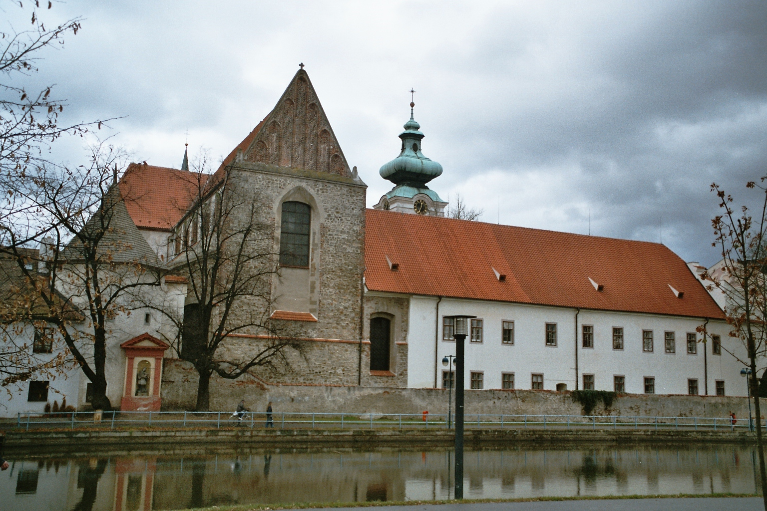 Presentation of Virgin Mary Church, České Budějovice, Czech republic; klášterní kostel Obětování Panny Marie